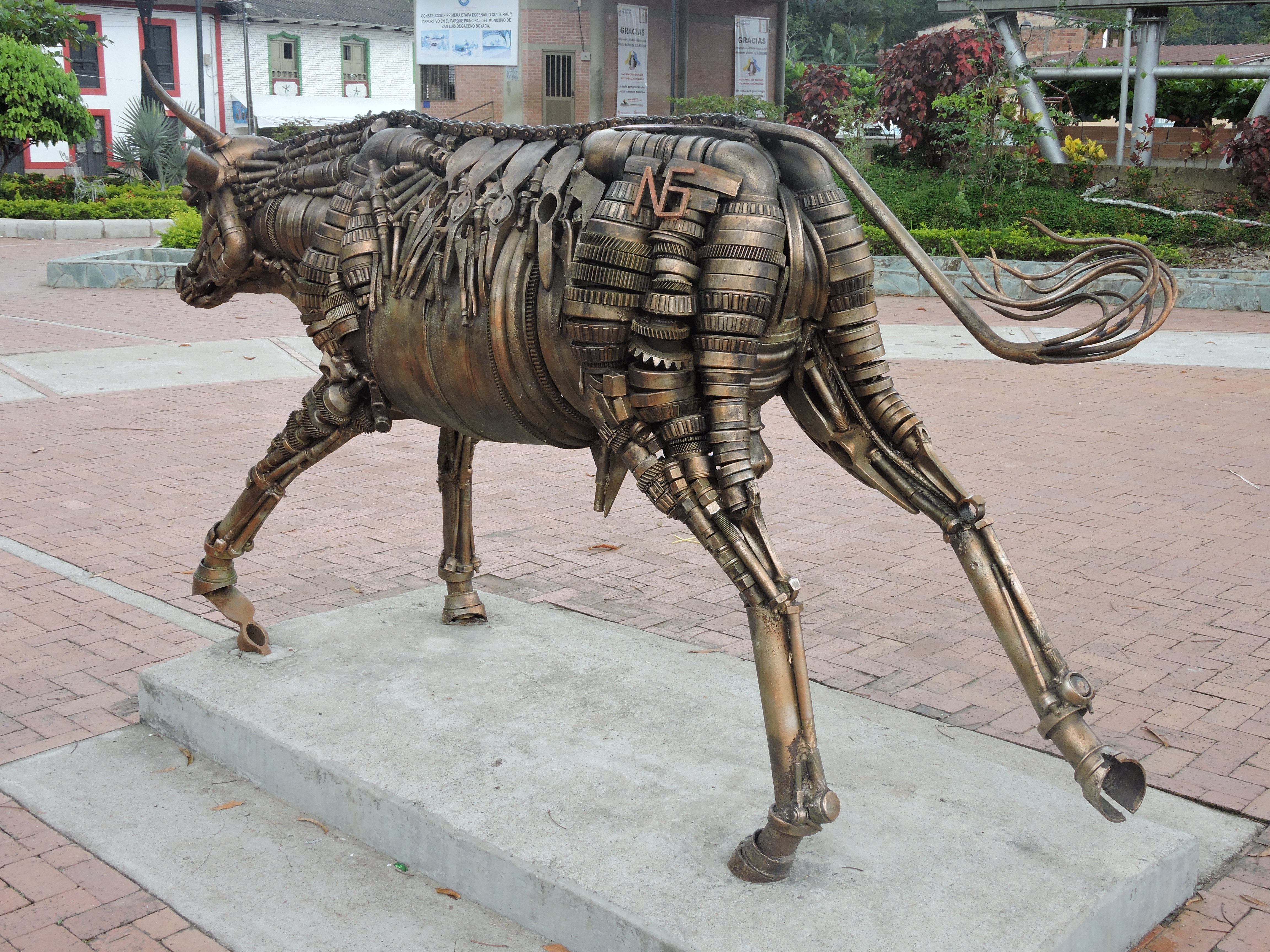 Escultura de toro en chatarra, Plaza de San Luís de Gaceno - Boyaca, Colombia Esta fotografía fue tomada en el municipio colombiano con código 15667.